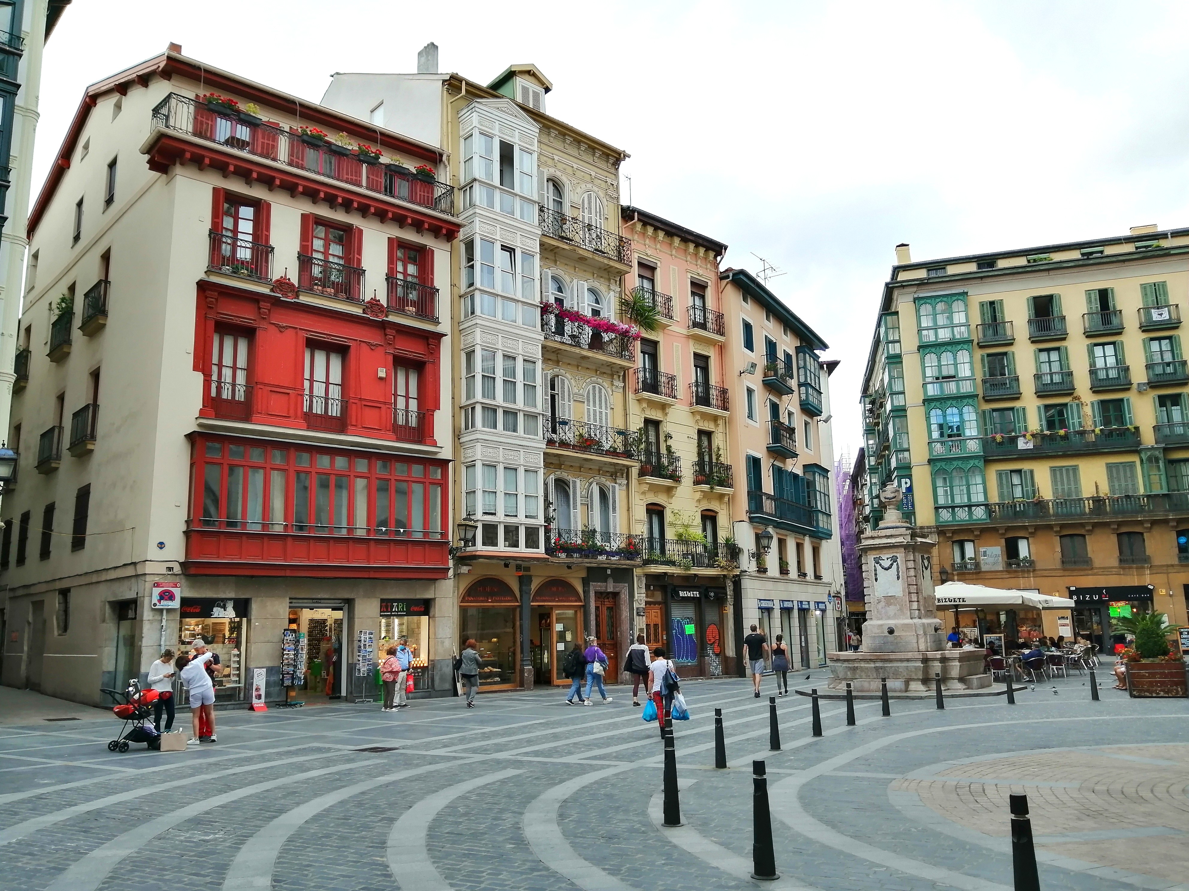 Done Jakue plaza, Bilbon